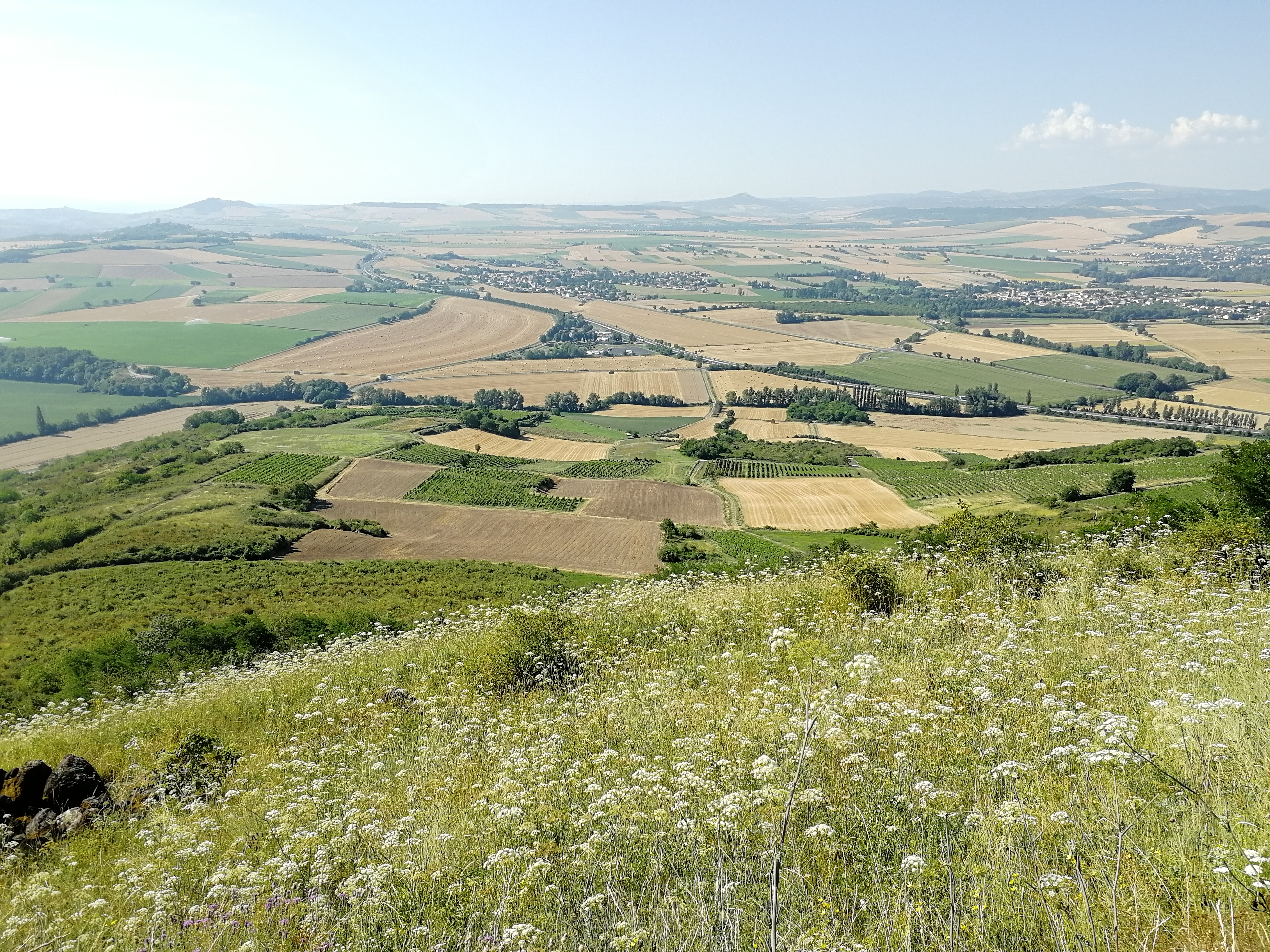 Corent, Puy-de-Dôme, France